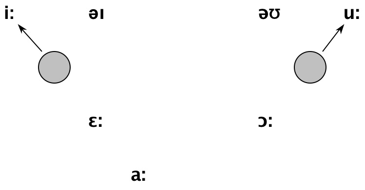 元音大推移-拉变链-第二阶段示意图